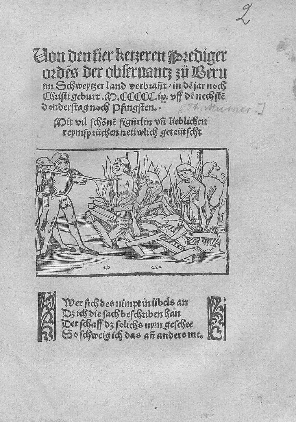 Titelblatt der Flugschrift Thomas Murner Von den fier ketzeren Prediger. Strassburg 1509 zum Jetzerhandel